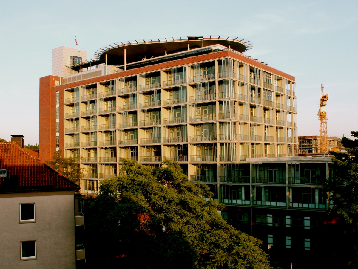 Das Universitätsklinikum Bergmannsheil